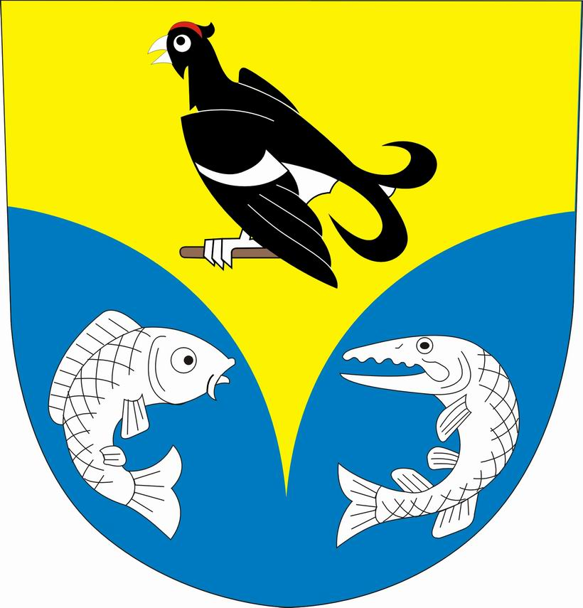 Česky: Znak obce Přívrat